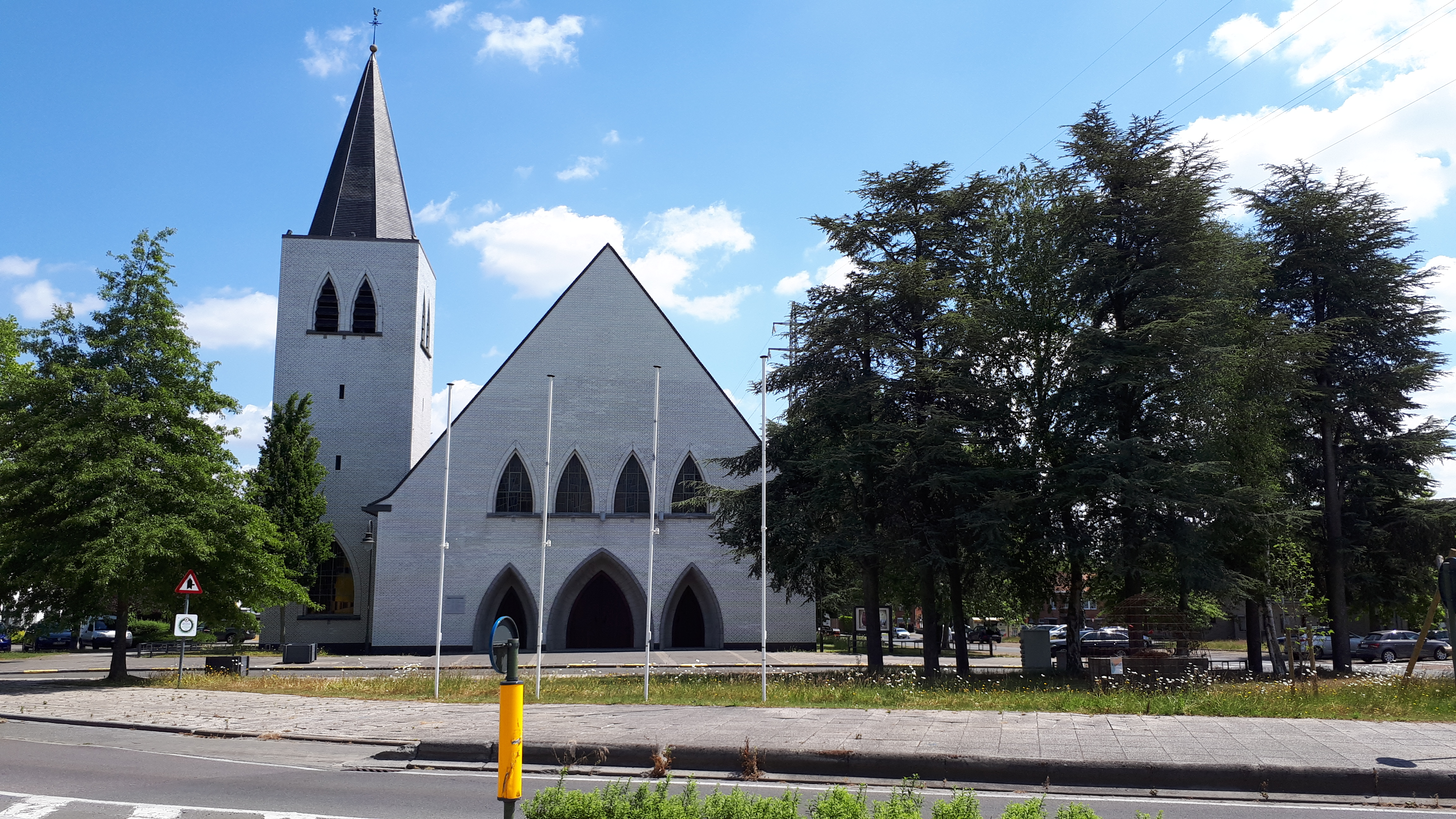 H.-Familiekerk (voorkant)